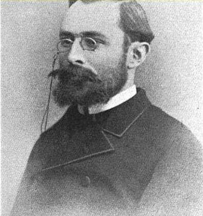 Carl Höchberg (1853-1885)